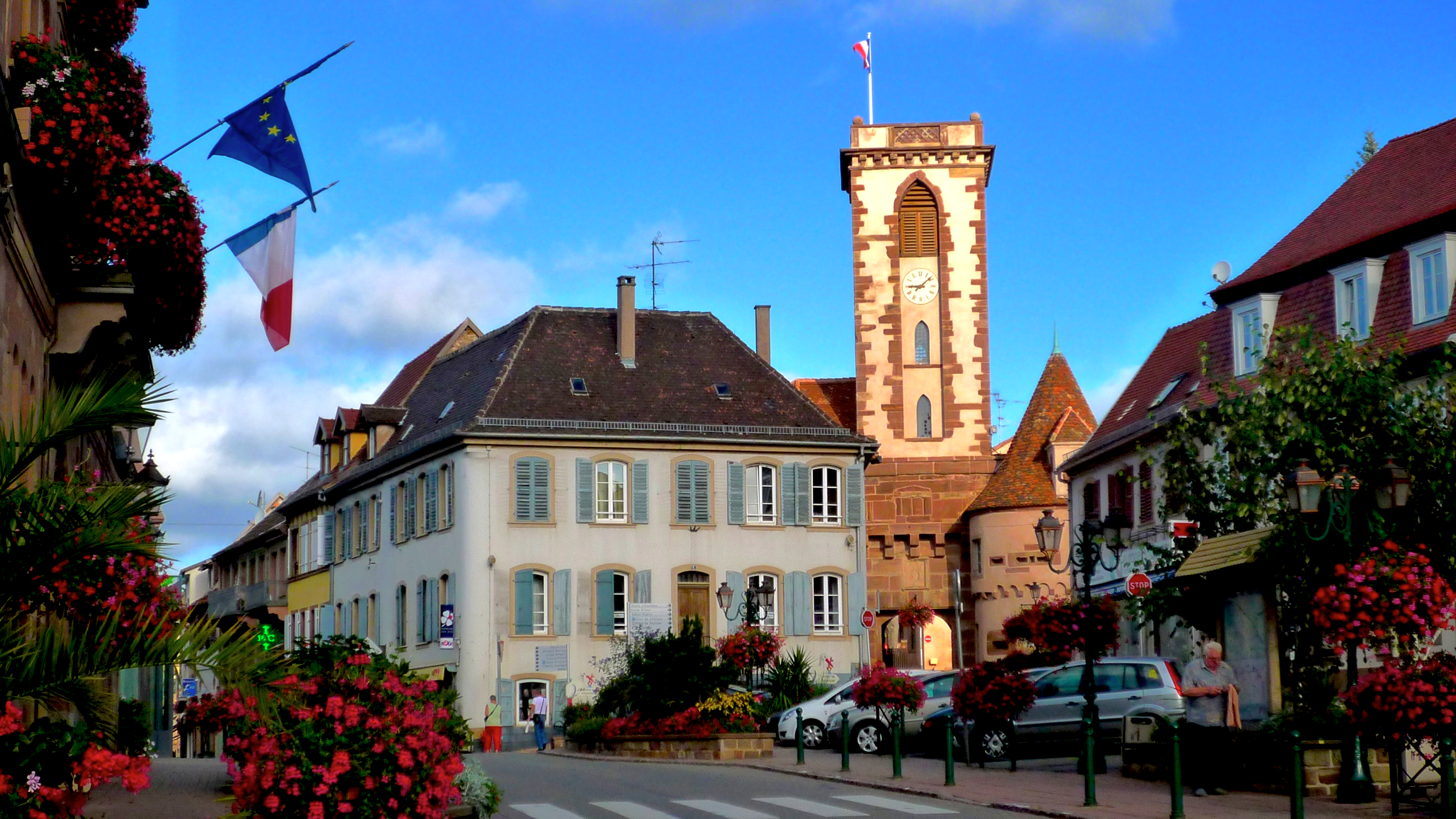 Wasselonne, la tour du château depuis la place du général de Gaulle, 2011.